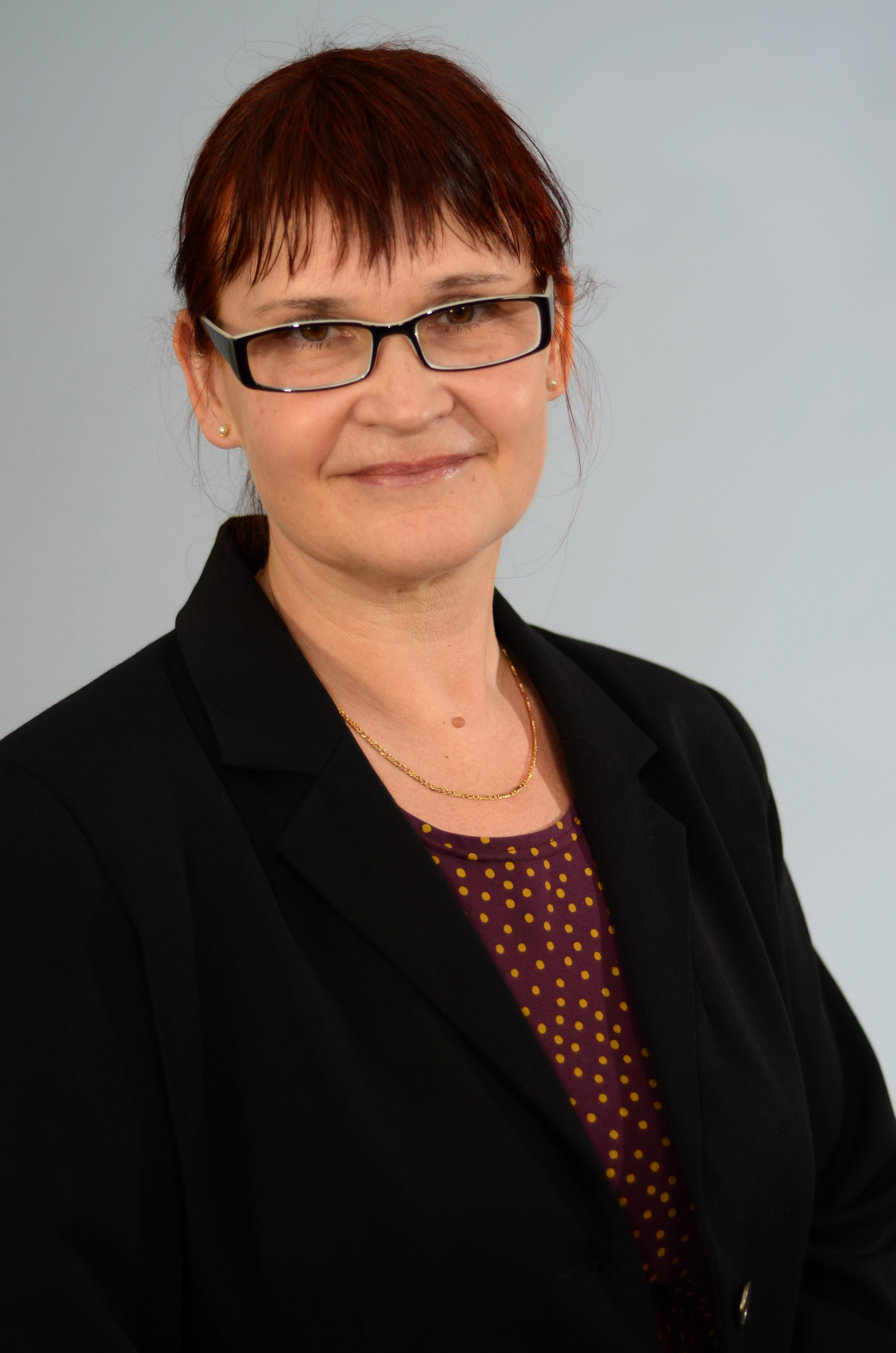 Miljöpartiets riksdagsledamot Annika Lillemets. Foto: Johan Schiff